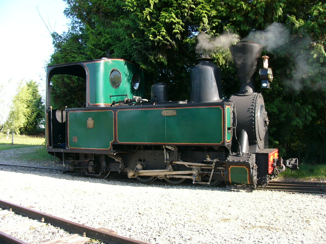 Locomotive 031T Decauville au bois de Bellébat